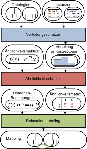 Architektur des GLUE-Systems (FMC-Aufbaudiagramm)